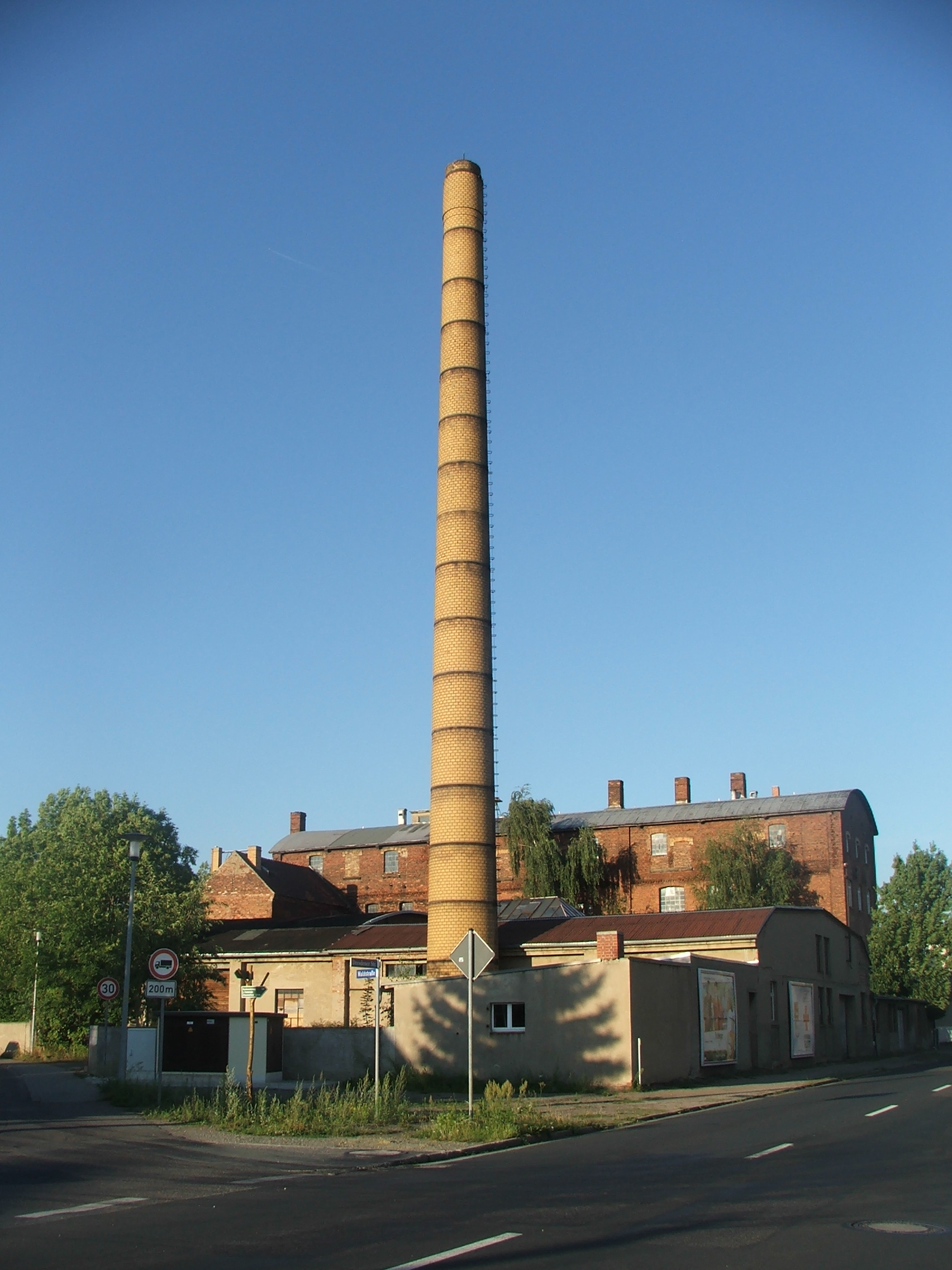 ehemalige Hohenzollernzeche in Bad Liebenwerda